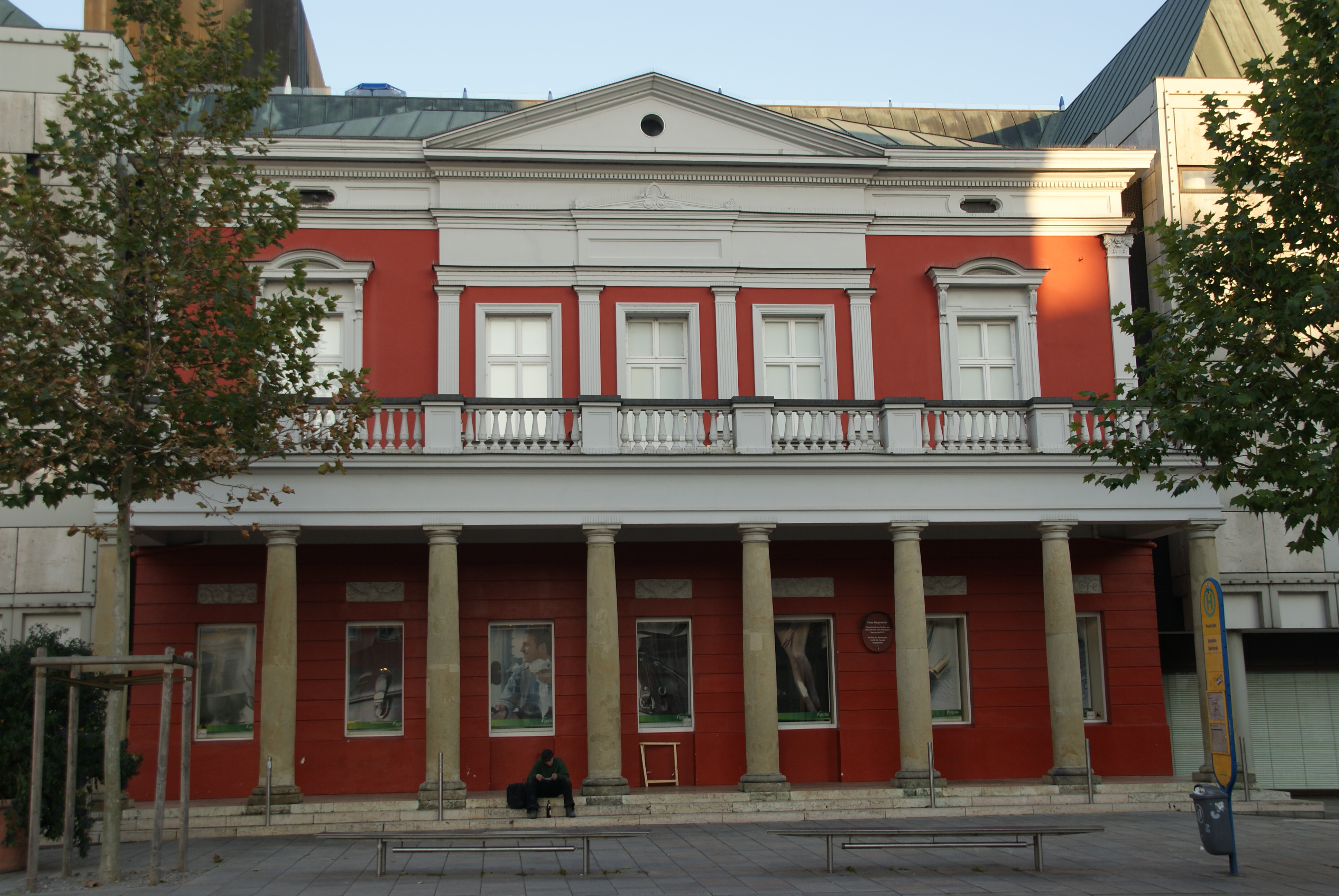 Fassade der Alten Wache in Regensburg, erbaut 1818 nach Plänen von Michael Dobmayr. Der sichbare Gebäuderest ist heute in einen Kaufhausneubau integriert.